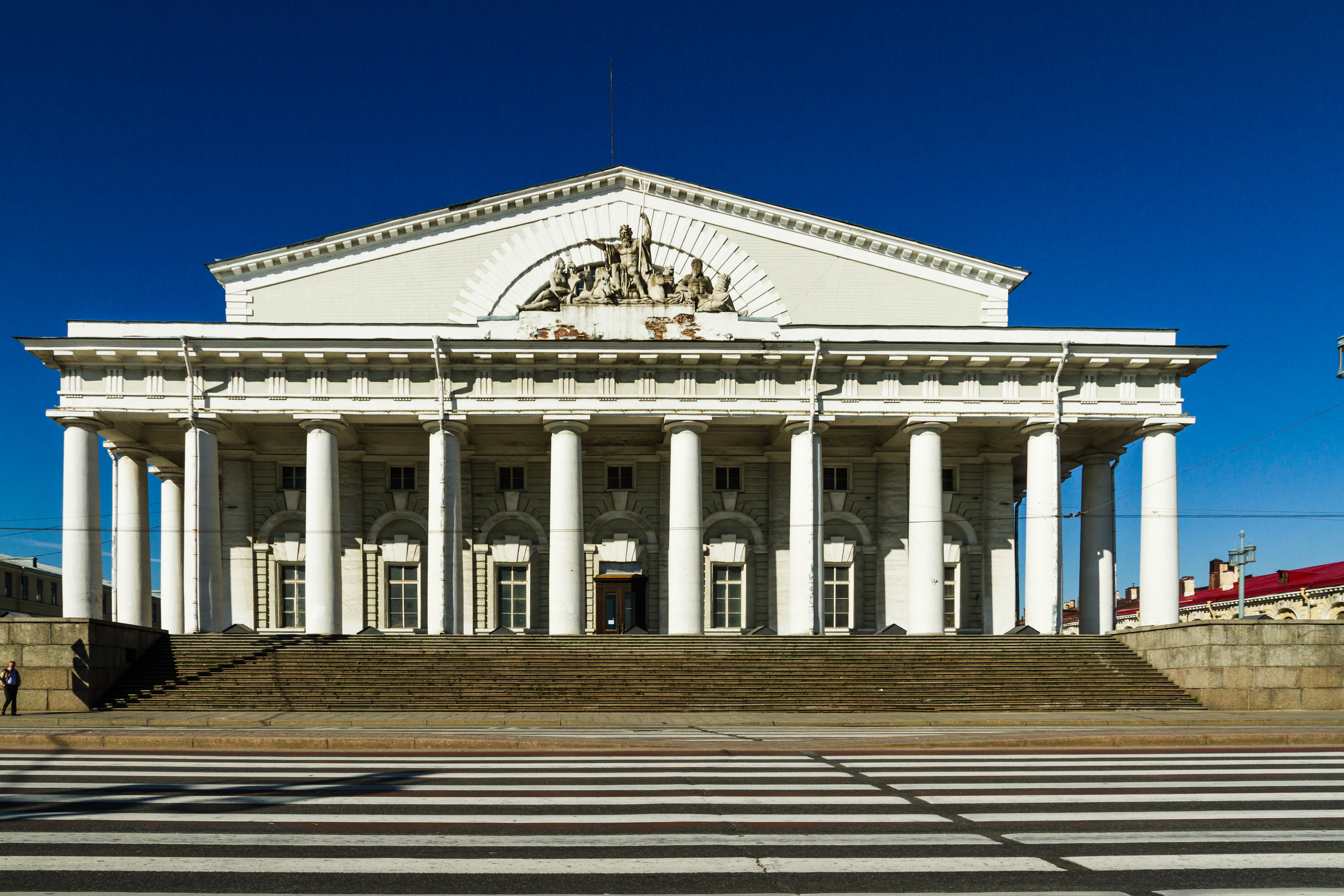 Old Saint Petersburg Stock Exchange